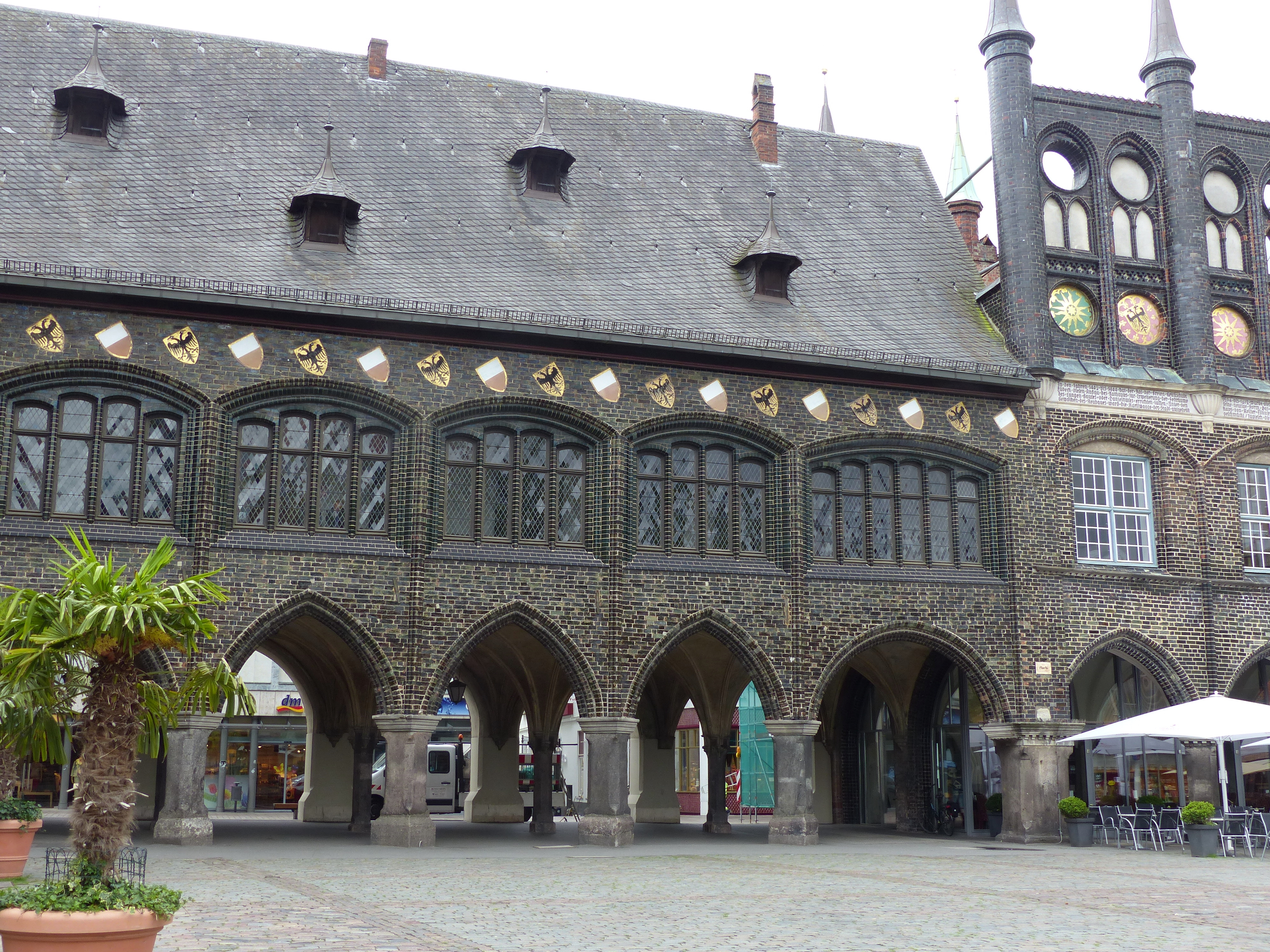 Lübecker Rathaus: Langes Haus vom Markt